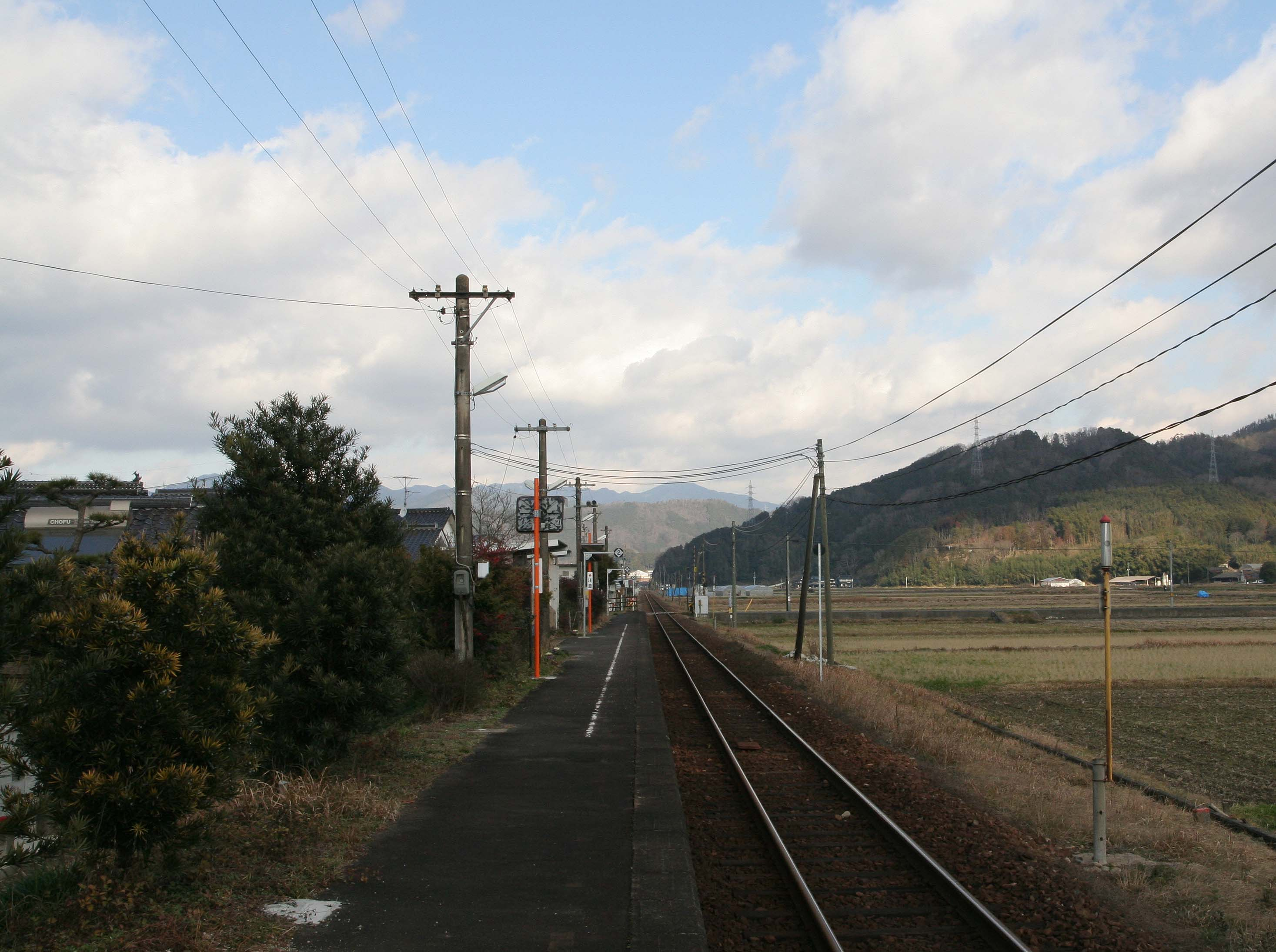 古見駅の構内